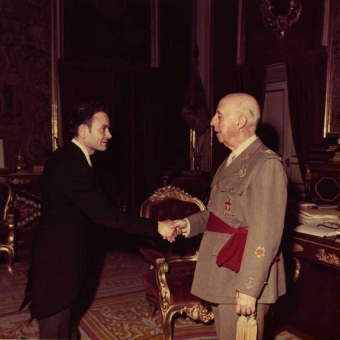 Carlos Galán de la Torre es recibido por el Jefe del Estado en el Palacio del Pardo por haber sido galardonado con Medalla de Oro en el XXI Salón Internacional de Invenciones de Bruselas